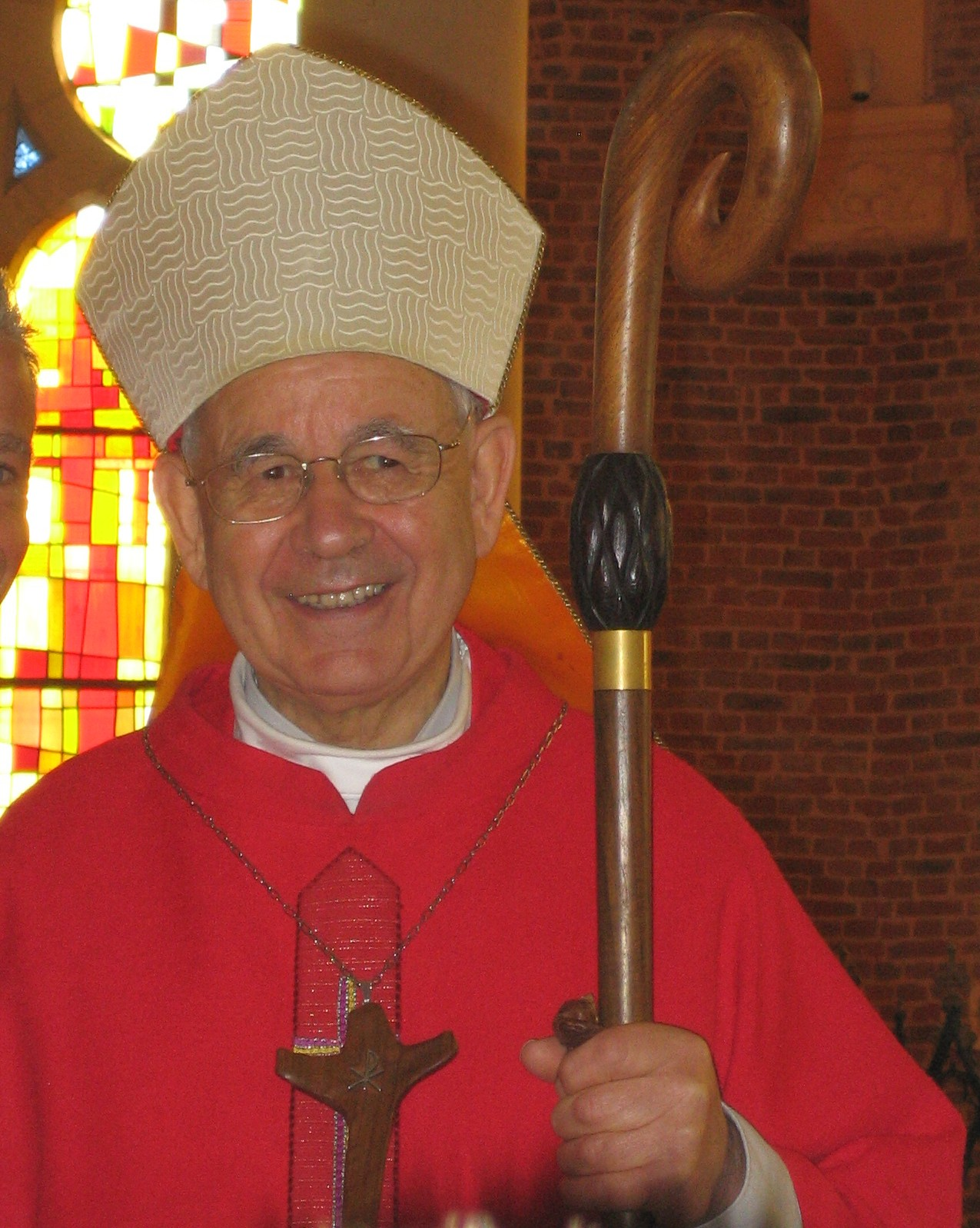 Photo de Mgr Herriot